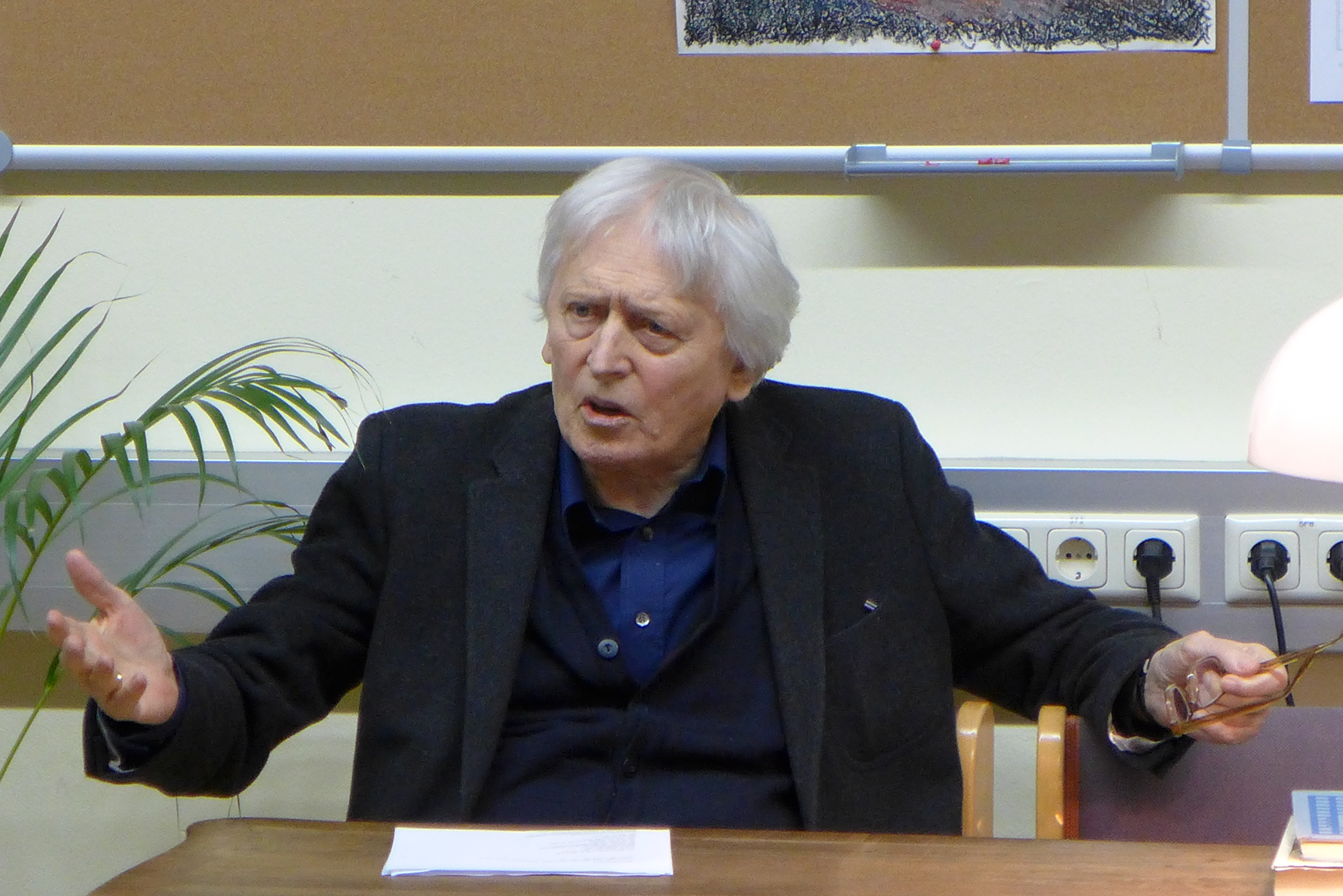 Alfred Kolleritsch, Lesung am 10. März 2016 im Akademischen Gymnasium Graz